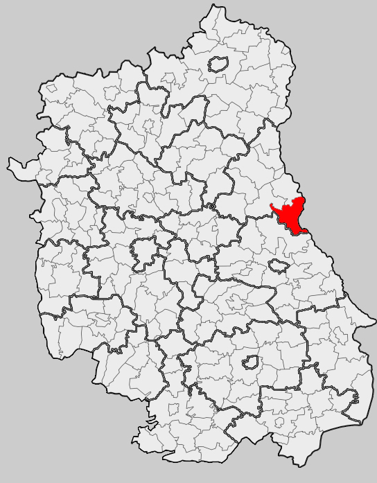 Map of gmina Wola Uhruska, Włodawa county, Lublin voivodship Mapa gminy Wola Uhruska, powiat włodawski, województwo lubelskie